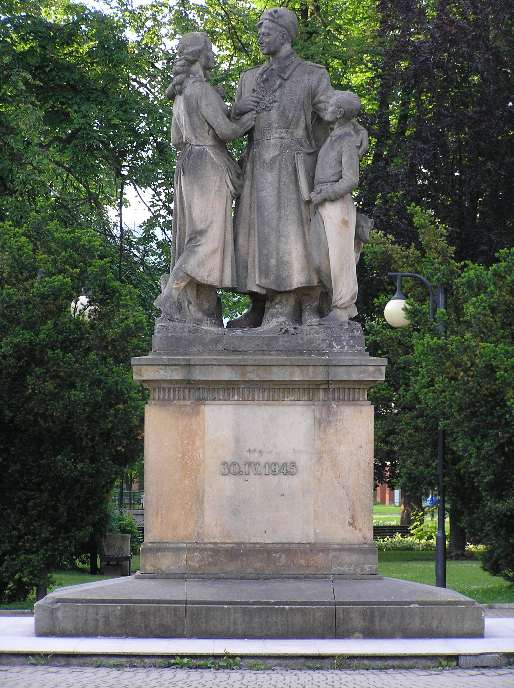 Pamätník obetiam vojny Námestie Andreja Hlinku, Žilina sochár Rudolf Pribiš (19.3.1913 - 3.7.1984), odhalené v r. 1955 10. výročí vstupu 1. čsl. armádneho zboru do mesta